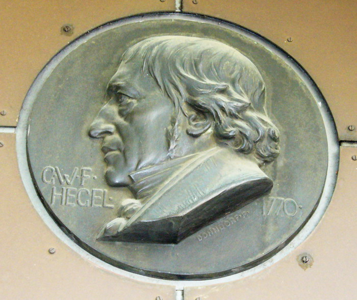 Stuttgart Hegel am Hegelhaus Stadtmitte